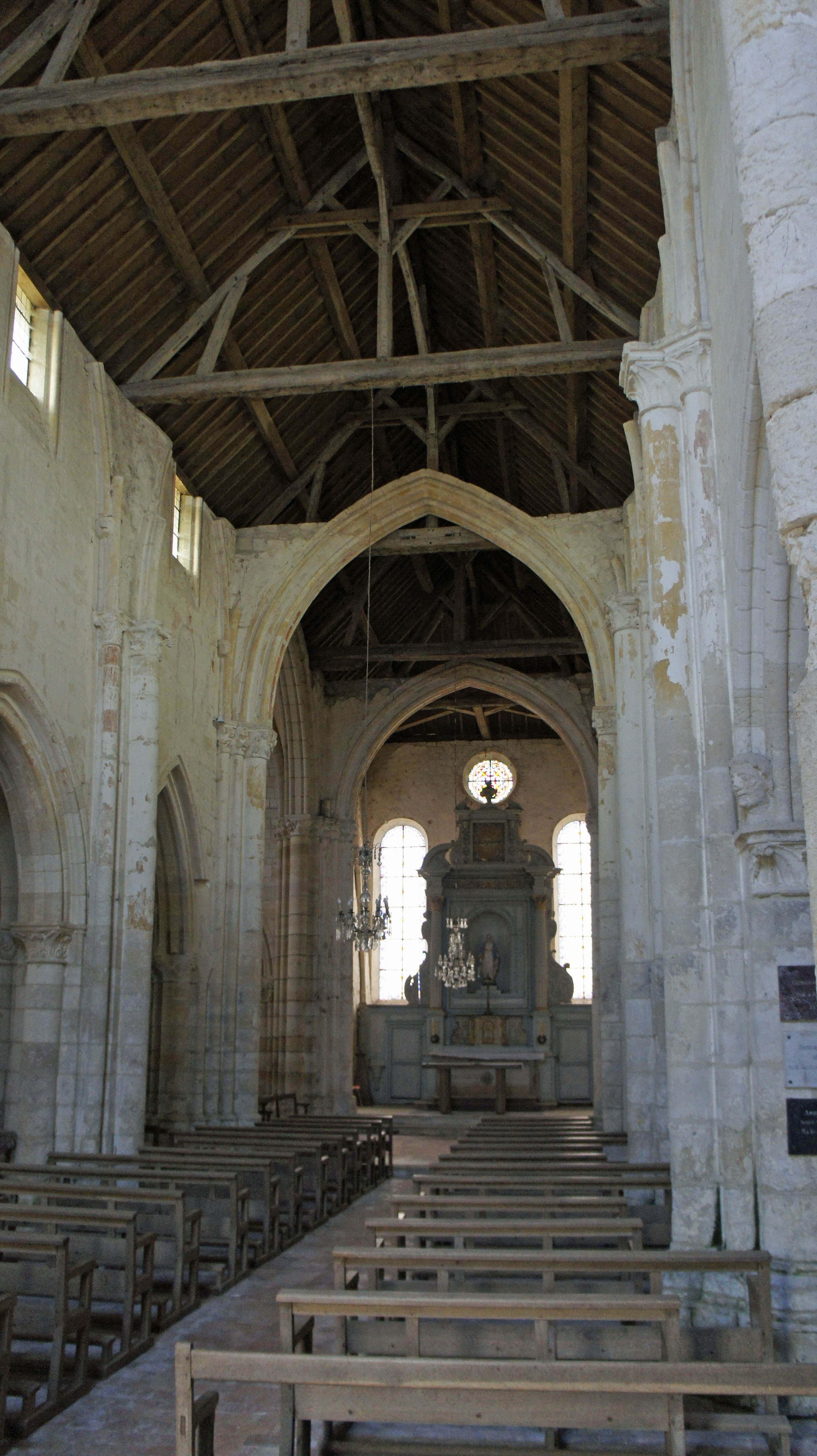 la nef de l'église de Hans , la voute n'est pas rebâtie.